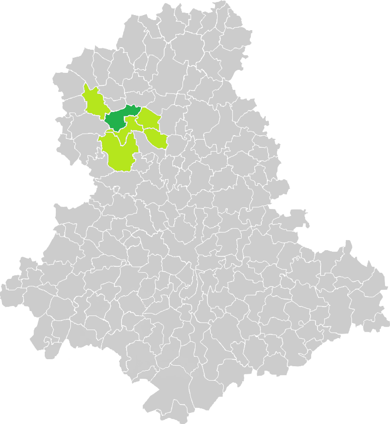 Carte de situation de la commune de Peyrat-de-Bellac (en vert foncé) dans le votre Canton (en vert clair) sur une carte des communes de la Haute-Vienne